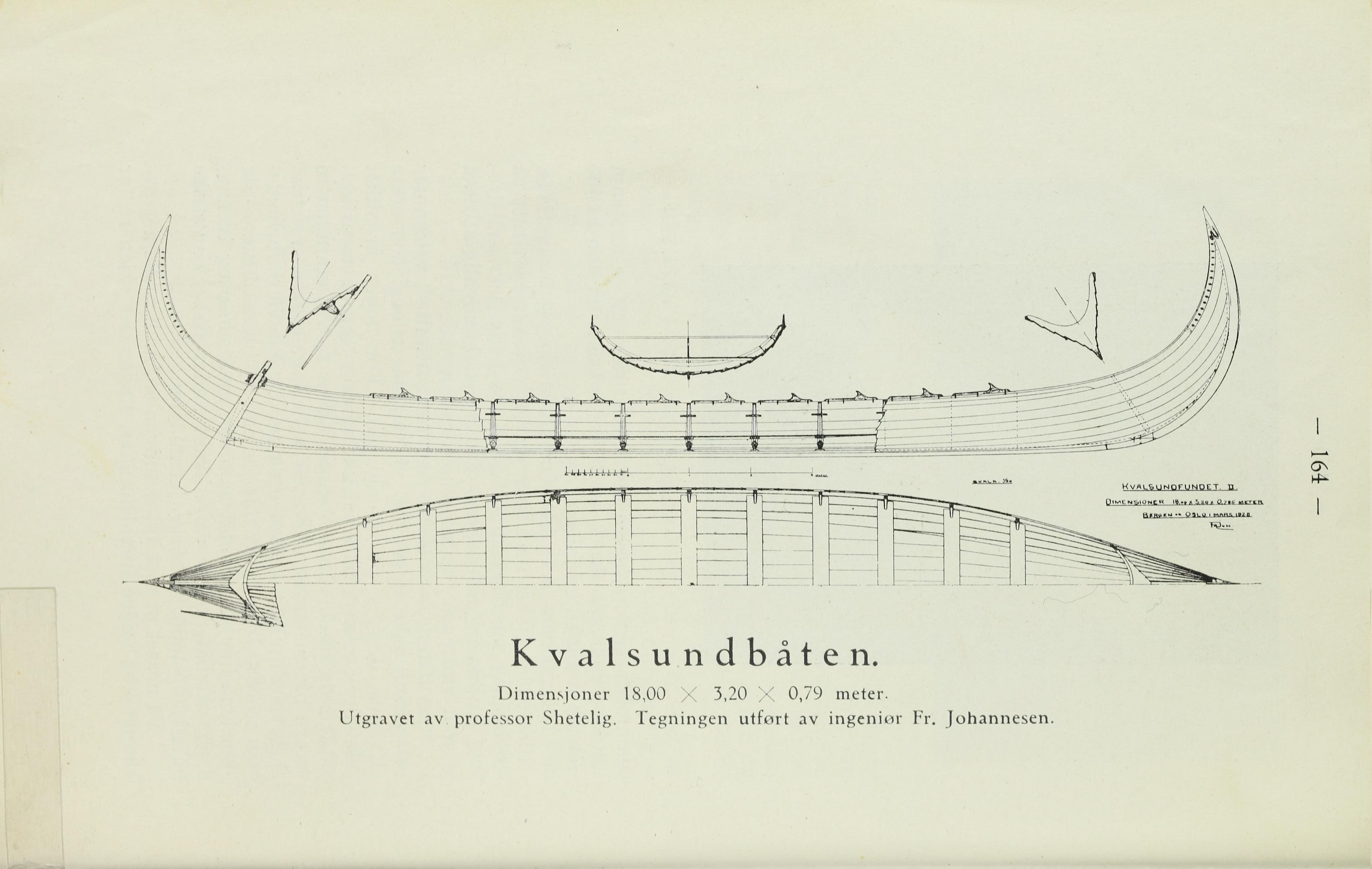 Illustrasjon hentet fra boken "Ålesund og Sunnmøre" av Knudsen, Einar og utgitt av Kjenn Ditt Land (Oslo, 1930)